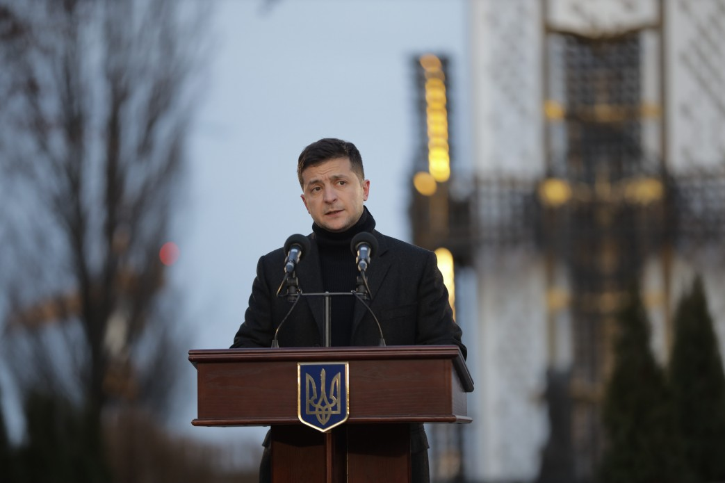 Вшануванні пам’яті жертв голодоморів в Україні у Києві (фото з сайту Президента України)